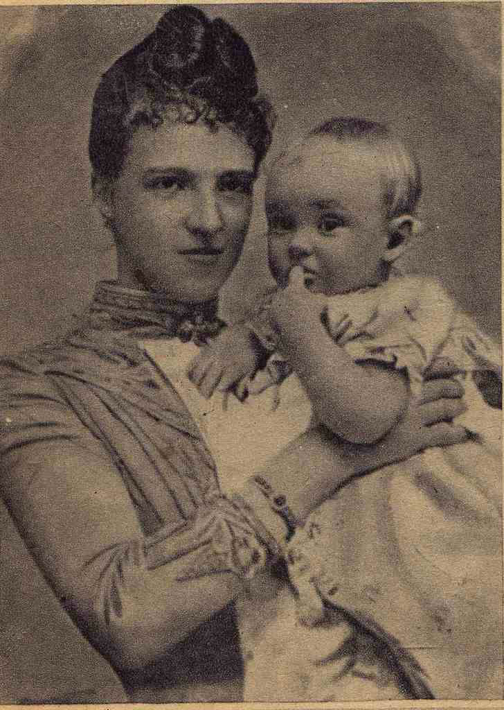 Rainha D. Amélia com o filho mais velho, o Príncipe Luís Filipe de Portugal